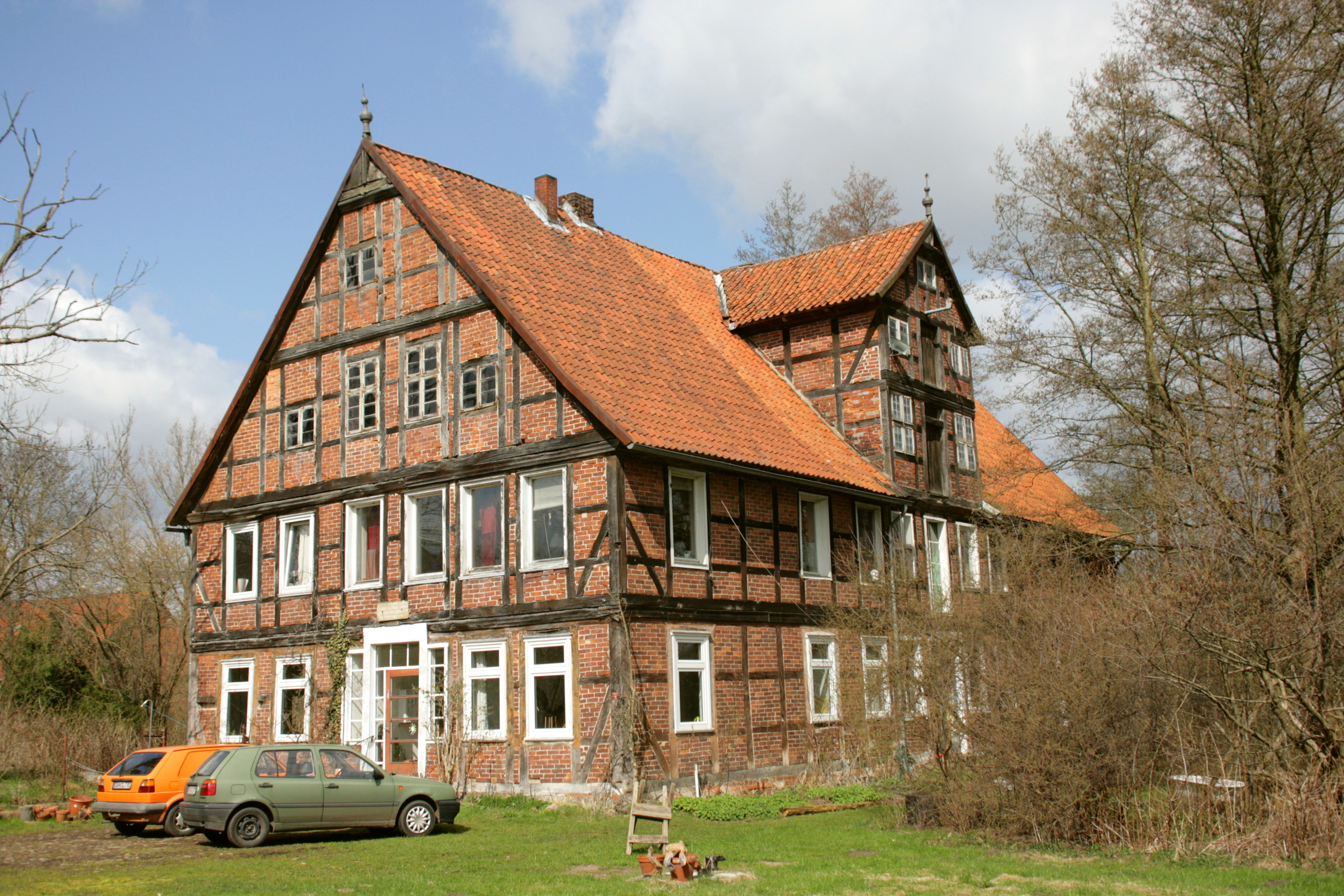 Wassermühle Zeetze am Köhlener Mühlenbach in Zeetze, Luckau (Wendland)